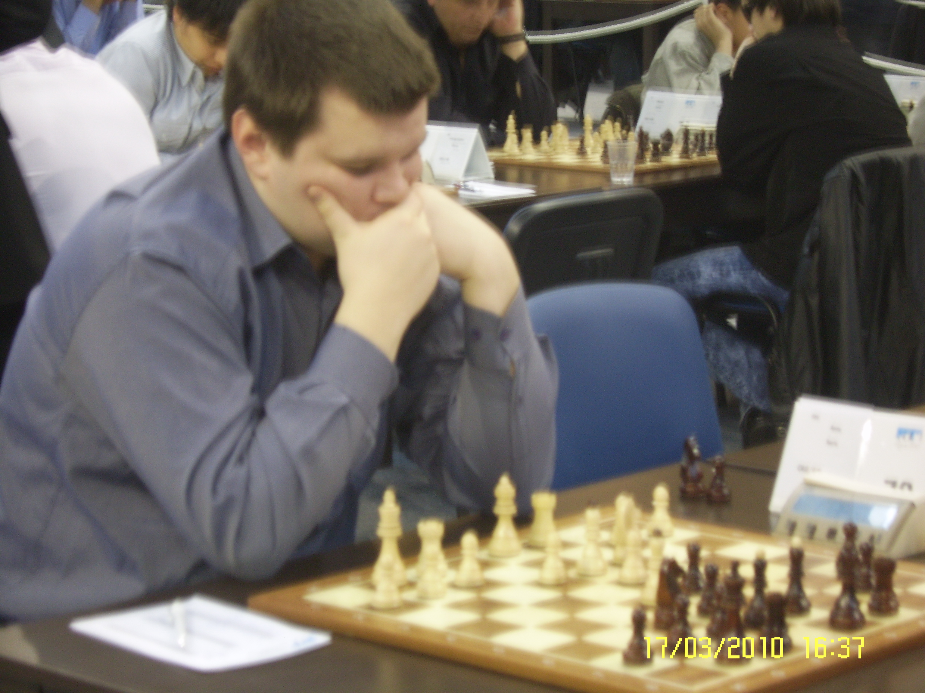 Hrvatski velemajstor Ante Šarić na 11. Europskom pojedinačnom prvenstvu u šahu za muškarce i žene 2010. g. u Rijeci